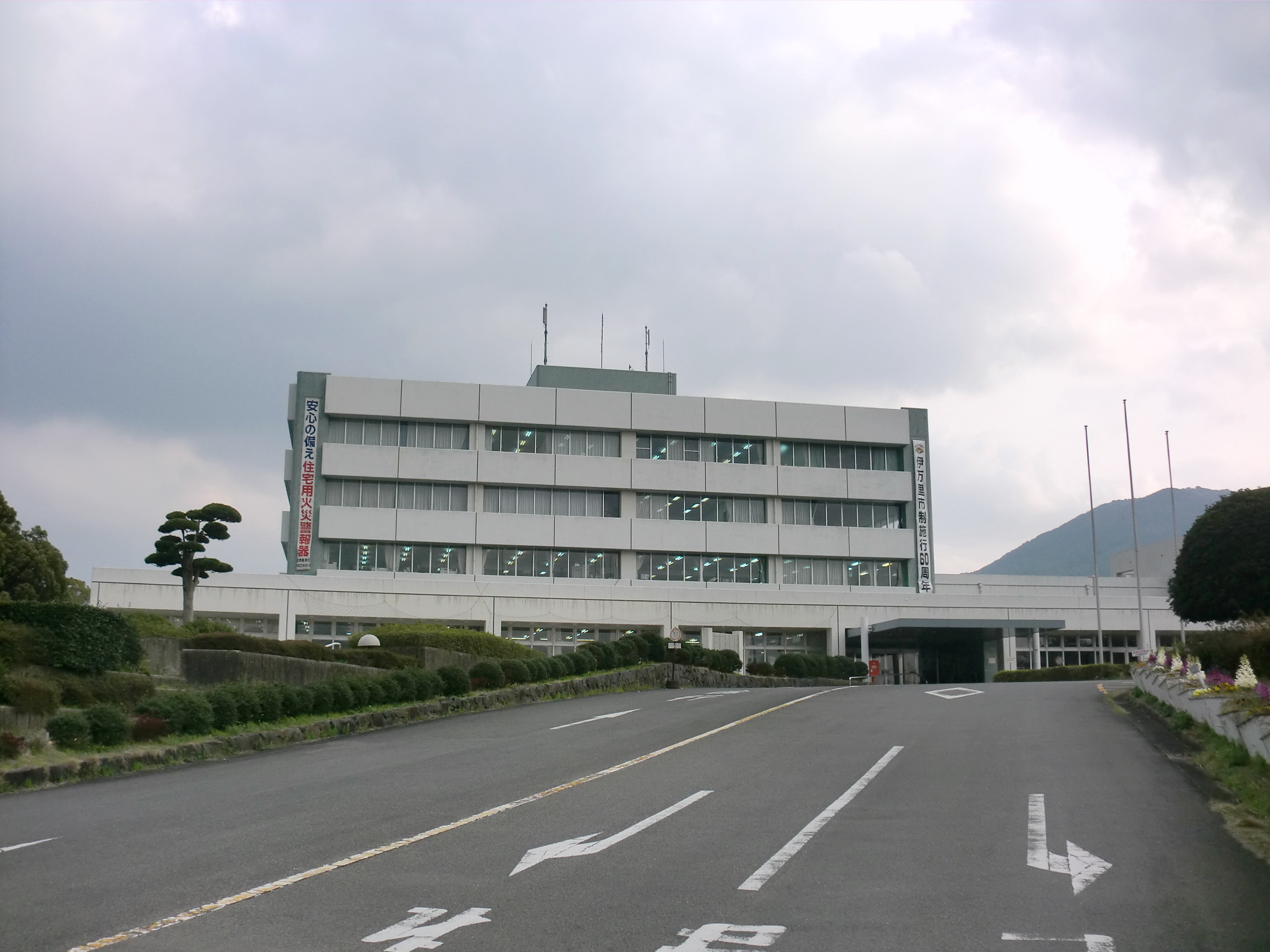 佐賀県伊万里市にある伊万里市役所